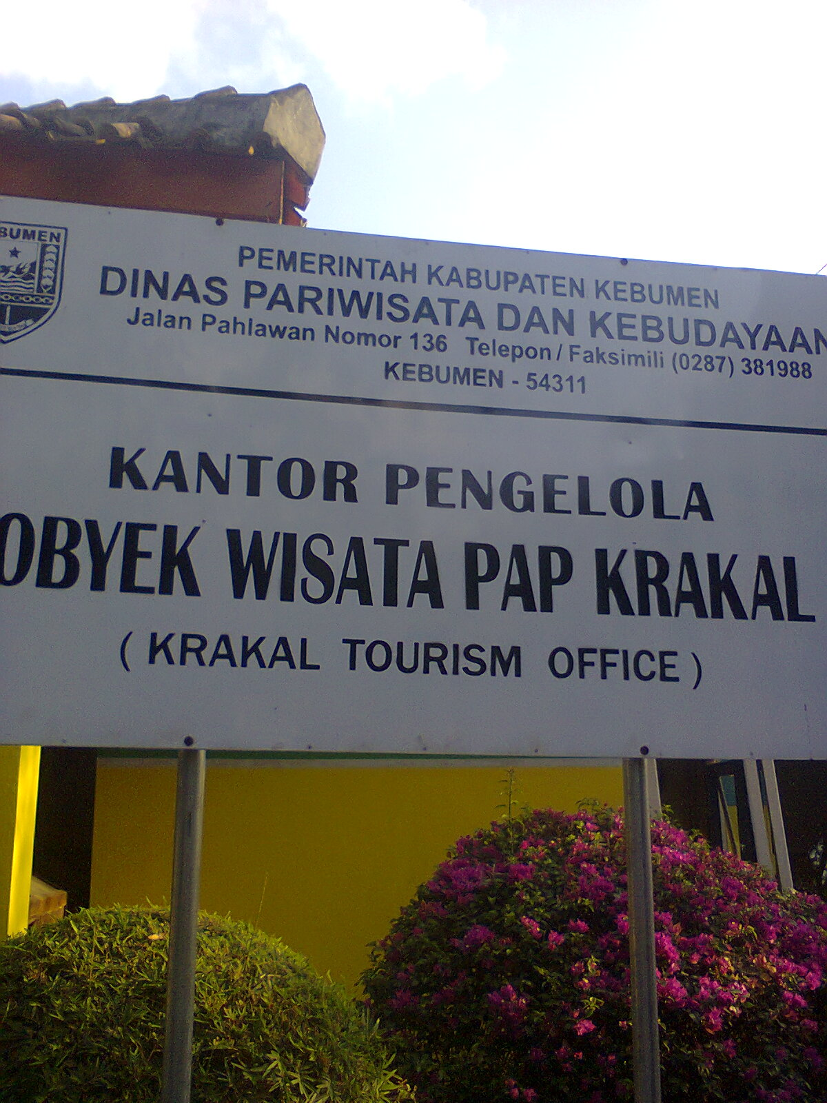 Pemandian Air panas Krakal